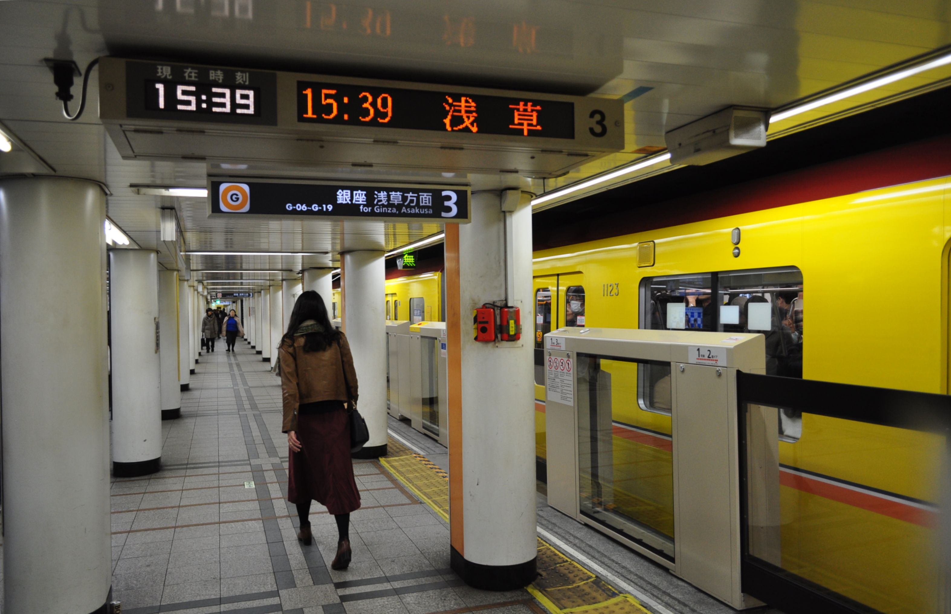 銀座線 赤坂見附駅